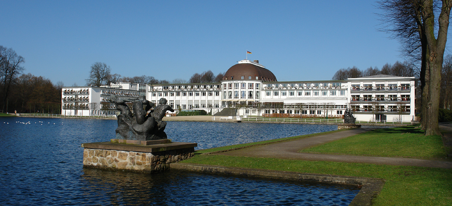 Park Hotel in Bremen Das abgebildete Objekt ist ein geschütztes Kulturdenkmal in der Freien Hansestadt Bremen, mit der Nr. 0218,T001 beim Landesamt für Denkmalpflege registriert.